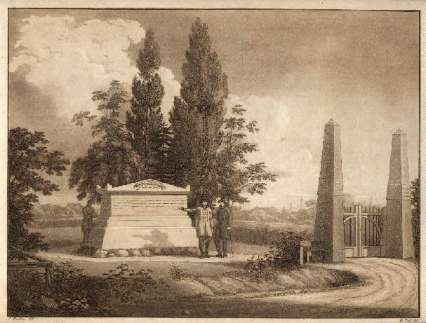 Epitaph für die im Winter 1813/14 gestorbenen 1138 Hamburger, die von den Franzosen nach Altona vertrieben wurden, auf dem Begräbnisplatz in Ottensen, einer Weide des Ottenser Vogts Prahl an der heutigen Einmündung der Erdmannstraße in die Große Brunnenstraße. Der Gedenkstein wurde auf Initiative der Patriotischen Gesellschaft von Carl Ludwig Wimmel geschaffen. Nach der Umbettung der Gebeine wurde 1841 auch das Denkmal auf die Friedhöfe an der heutigen Petersburger Straße in St. Pauli versetzt. Aquatinta-Kupferstich von G.Feder nach Siegfried Bendixen. 20,3 x 27,0 cm